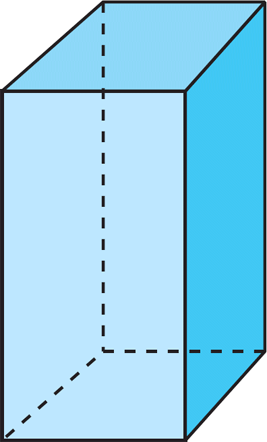 Es para ilustrar el problema de su diagonal